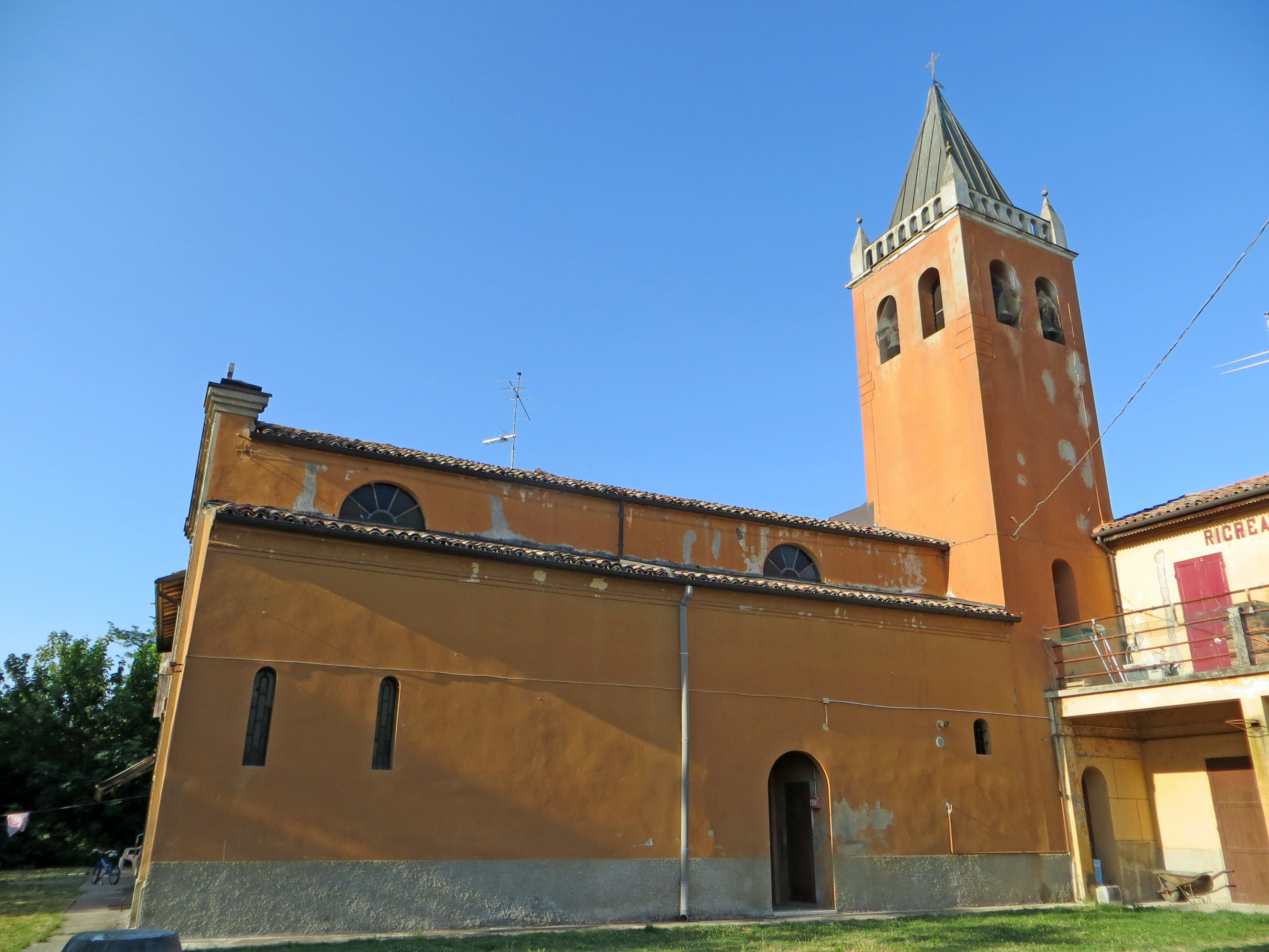 Chiesa di Santo Stefano (Martorano, Parma) - lato sud